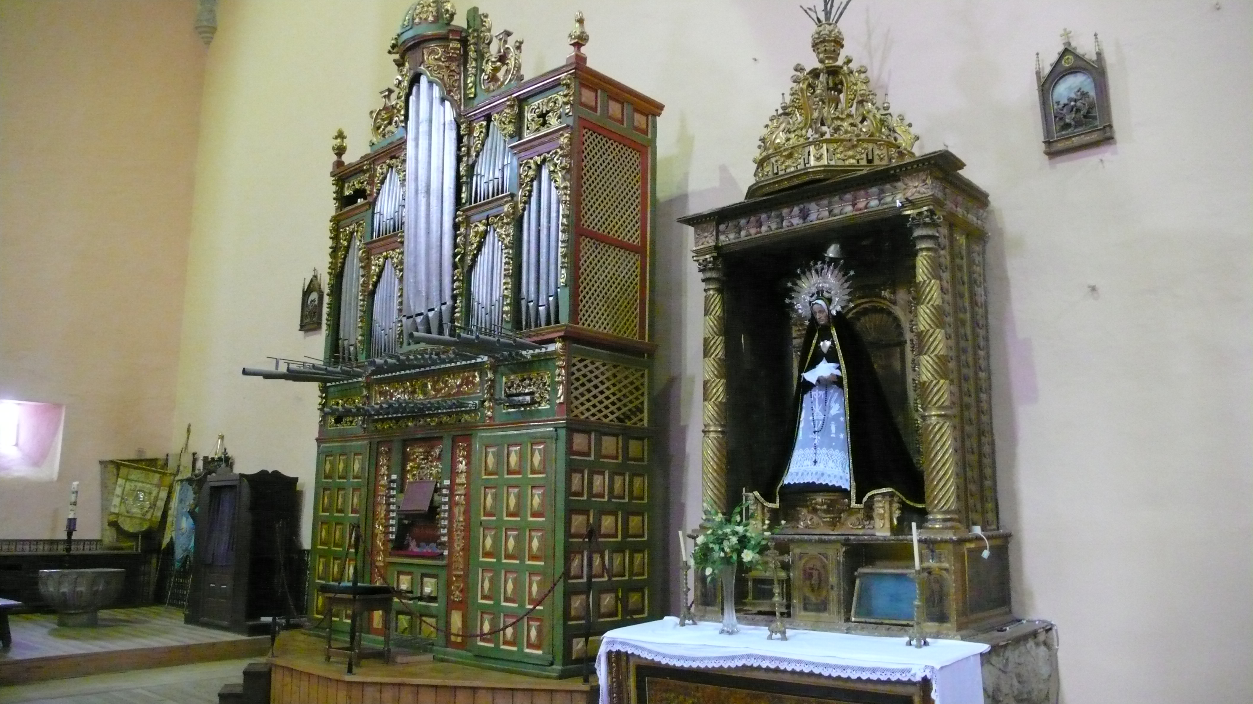 Es el organo de la iglesia de anguiano